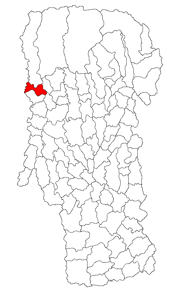 Categorie:Hărţi ale judeţului Argeş